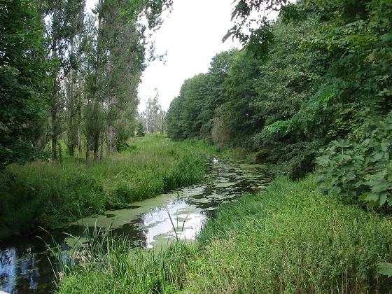 Pfefferfließ im Unterlauf bei Stangenhagen, Brandenburg